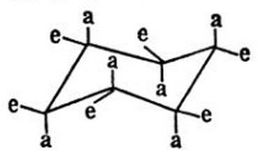 Նկ. 3. ցիկլո-հեքսանի բազկաթոռայիև կոնֆորմացիան աքսիալ (a) և էքվատորիալ (e) կապերով